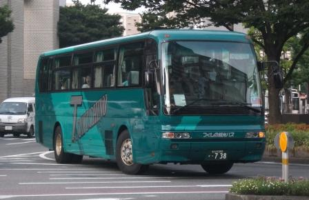 つくしの観光バスの貸切車